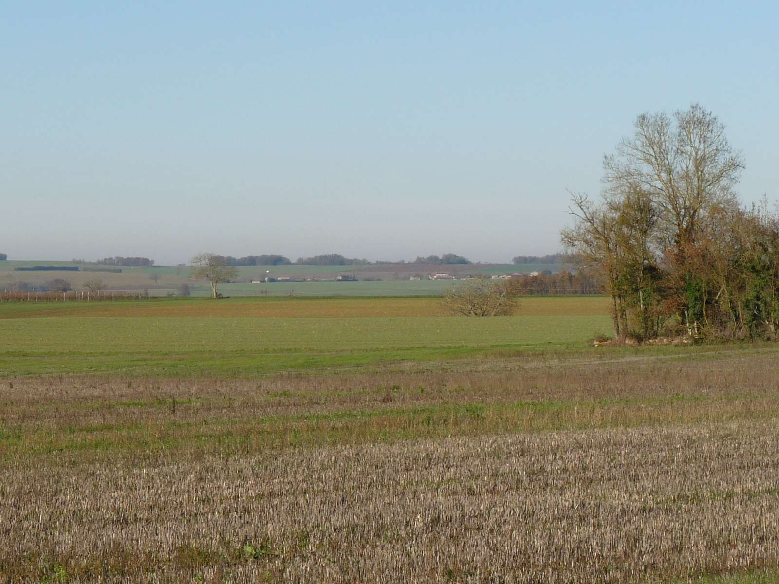 la campagne entre Lonnes et Juillé, Charente, France; vue vers le nord-ouest